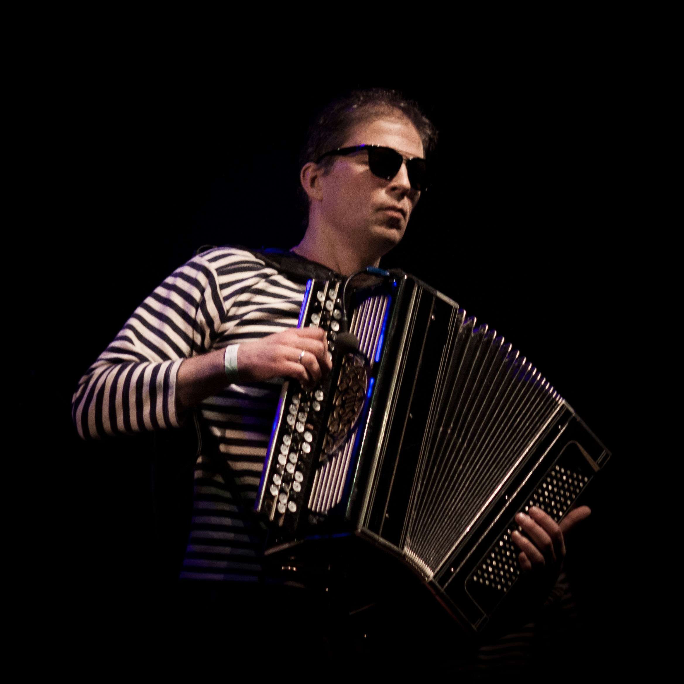 Концерт-презентация альбома Фёдора Чистякова "Ноль +30" в YotaSpace